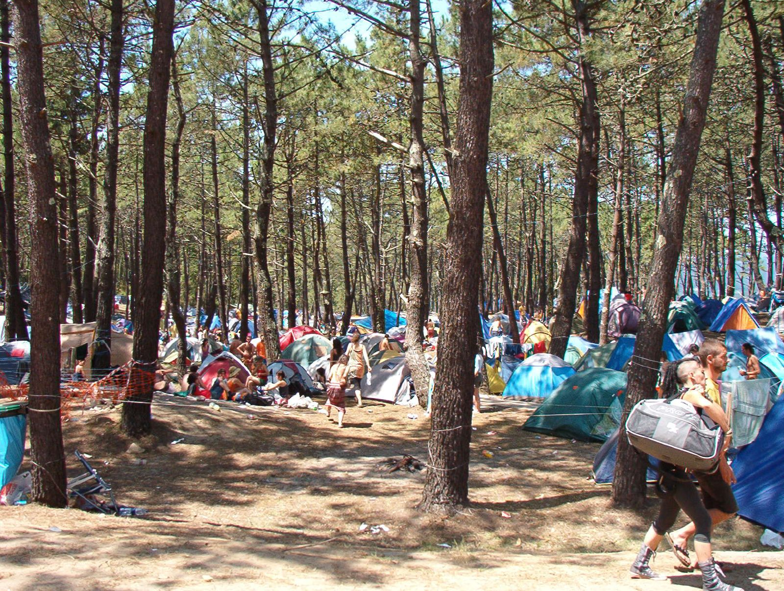 Festival da música celta de Ortigueira, Galiza